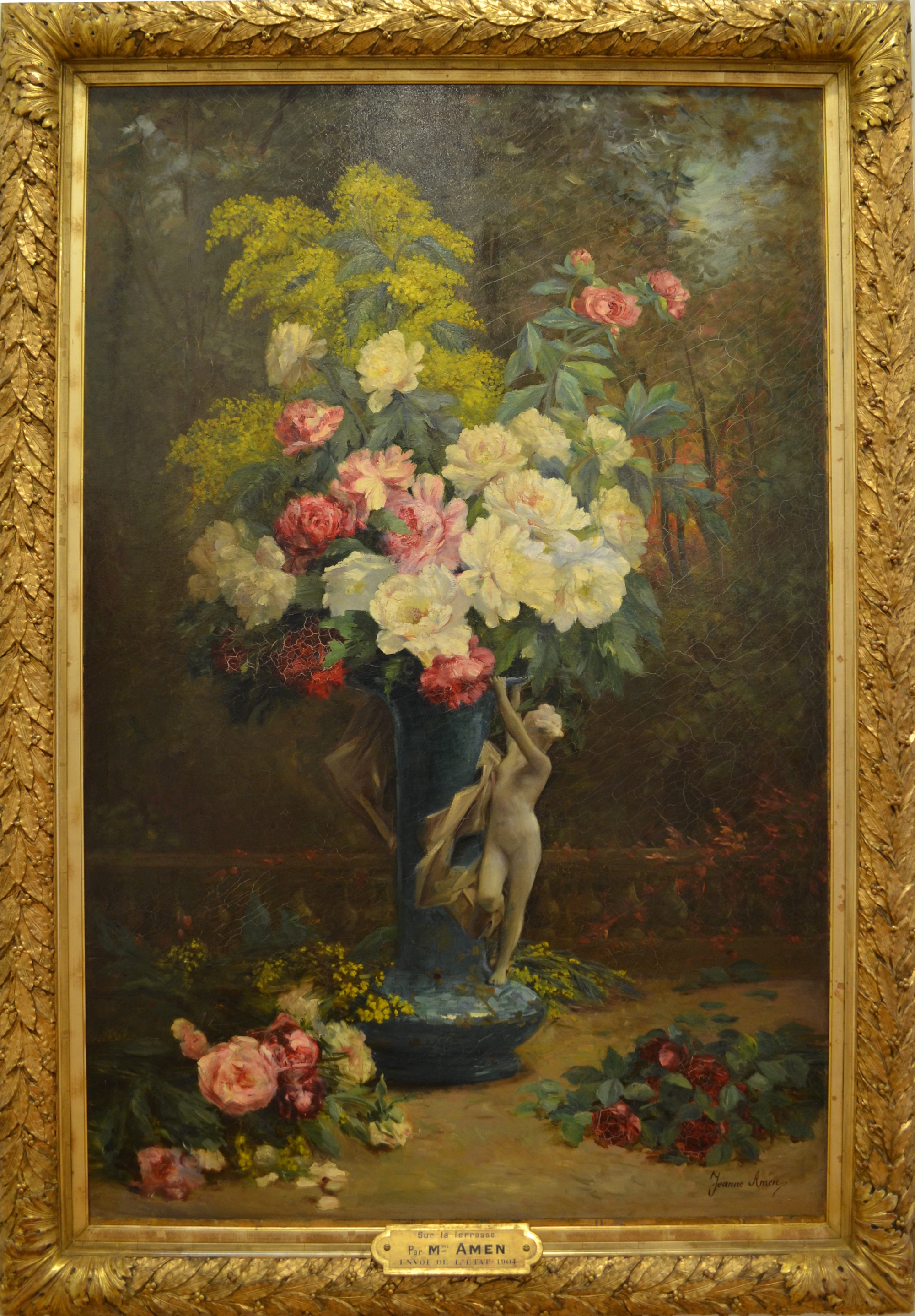 Tableau de Jeanne Amen intitulé Sur la terrasse. Huile sur toile. Dépôt de l'Etat de 1904. Transfert de propriété de l'Etat à Villefranche-sur-Saône, 2012.